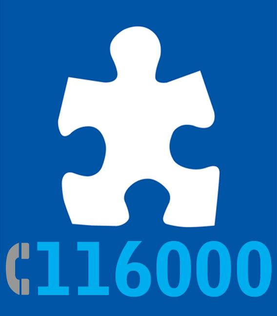 Hotline 116 000 logo danmark